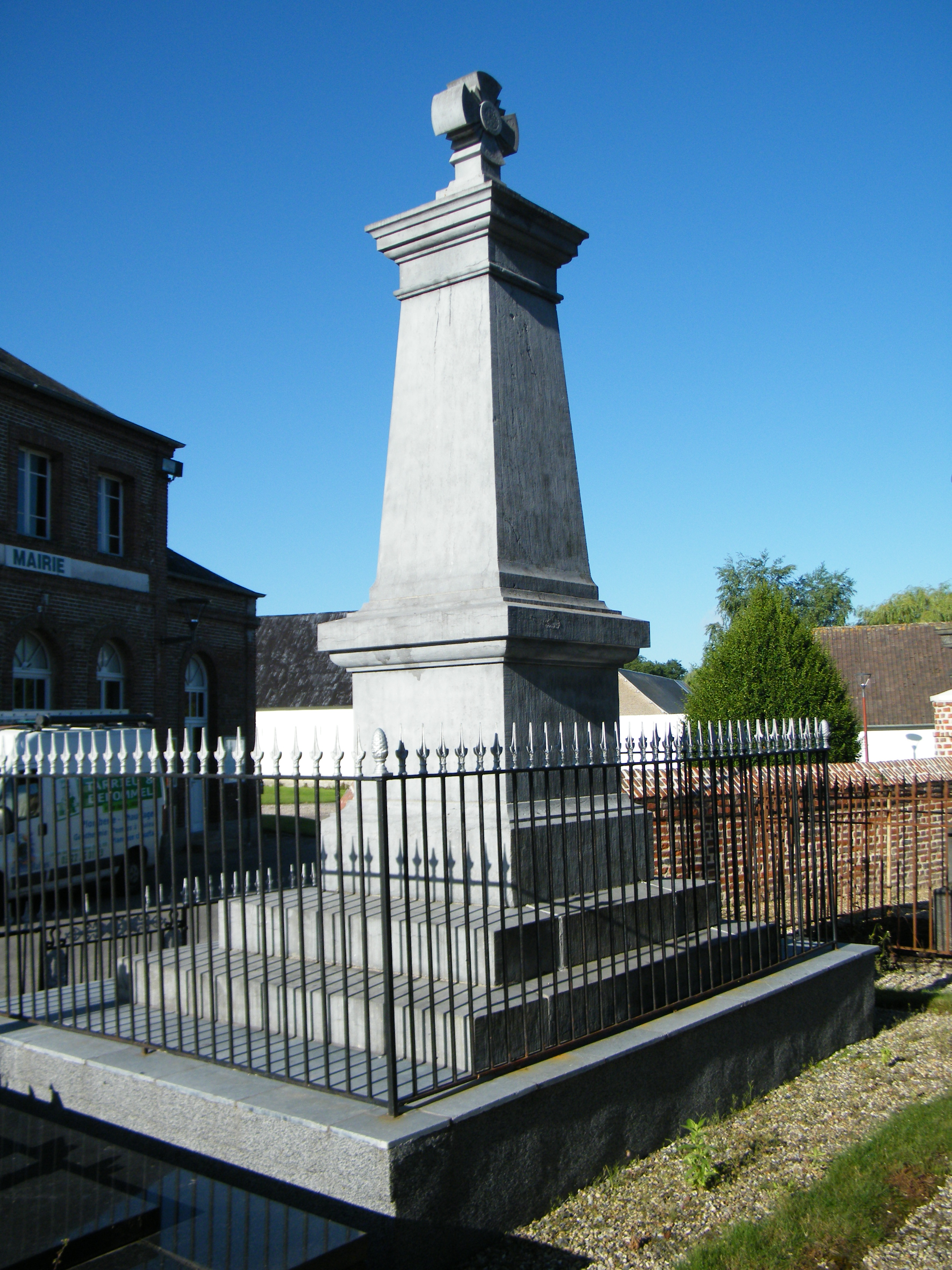 Monument aux morts pour la patrie, dans le cimetière de Villers-sur-Authie, Somme, France.